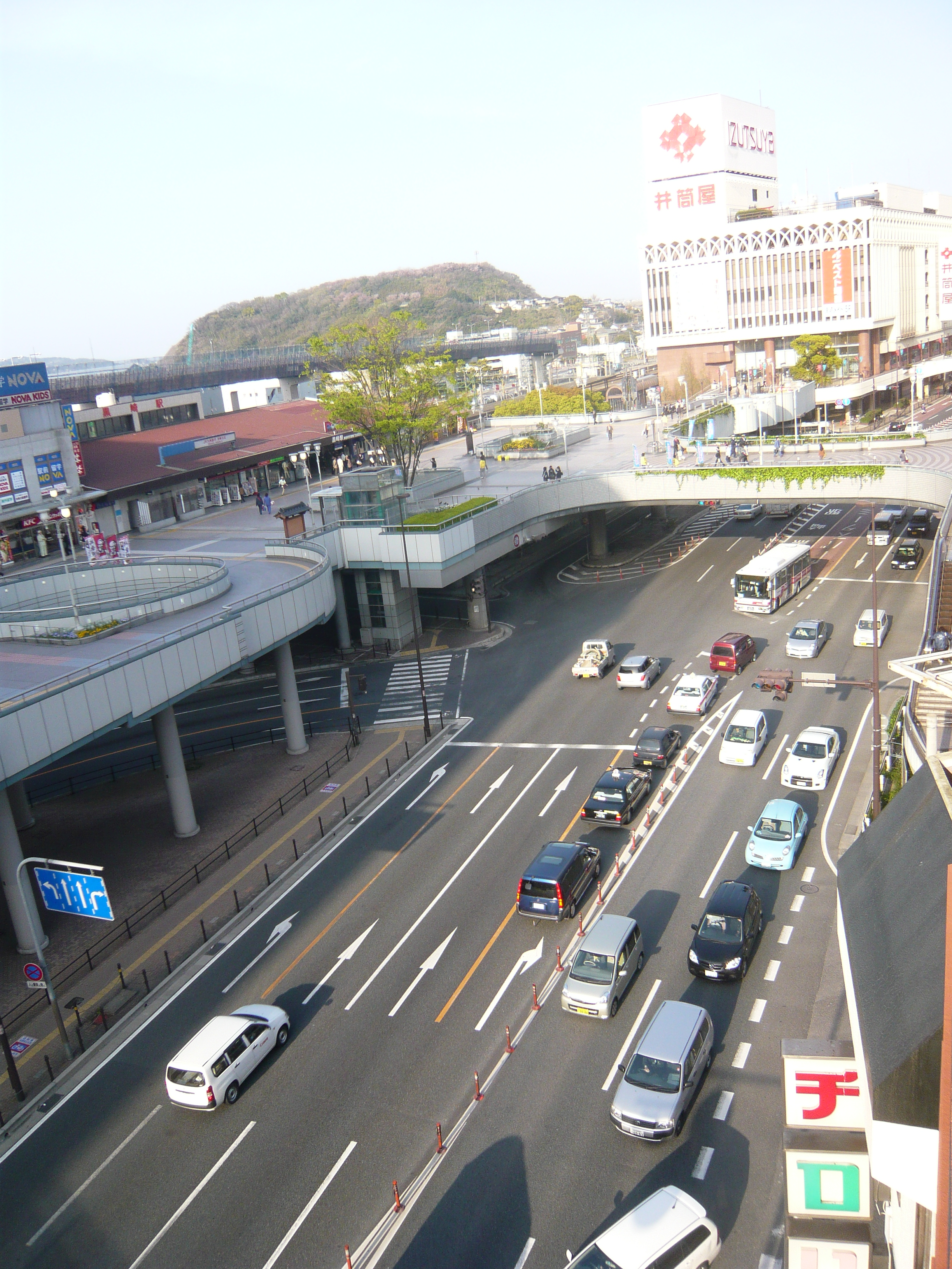 Route 3 (Japan) 黒崎駅前,（国道3号）,Kitakyushu,Fukuoka,Japan（福岡県北九州市）で撮影。